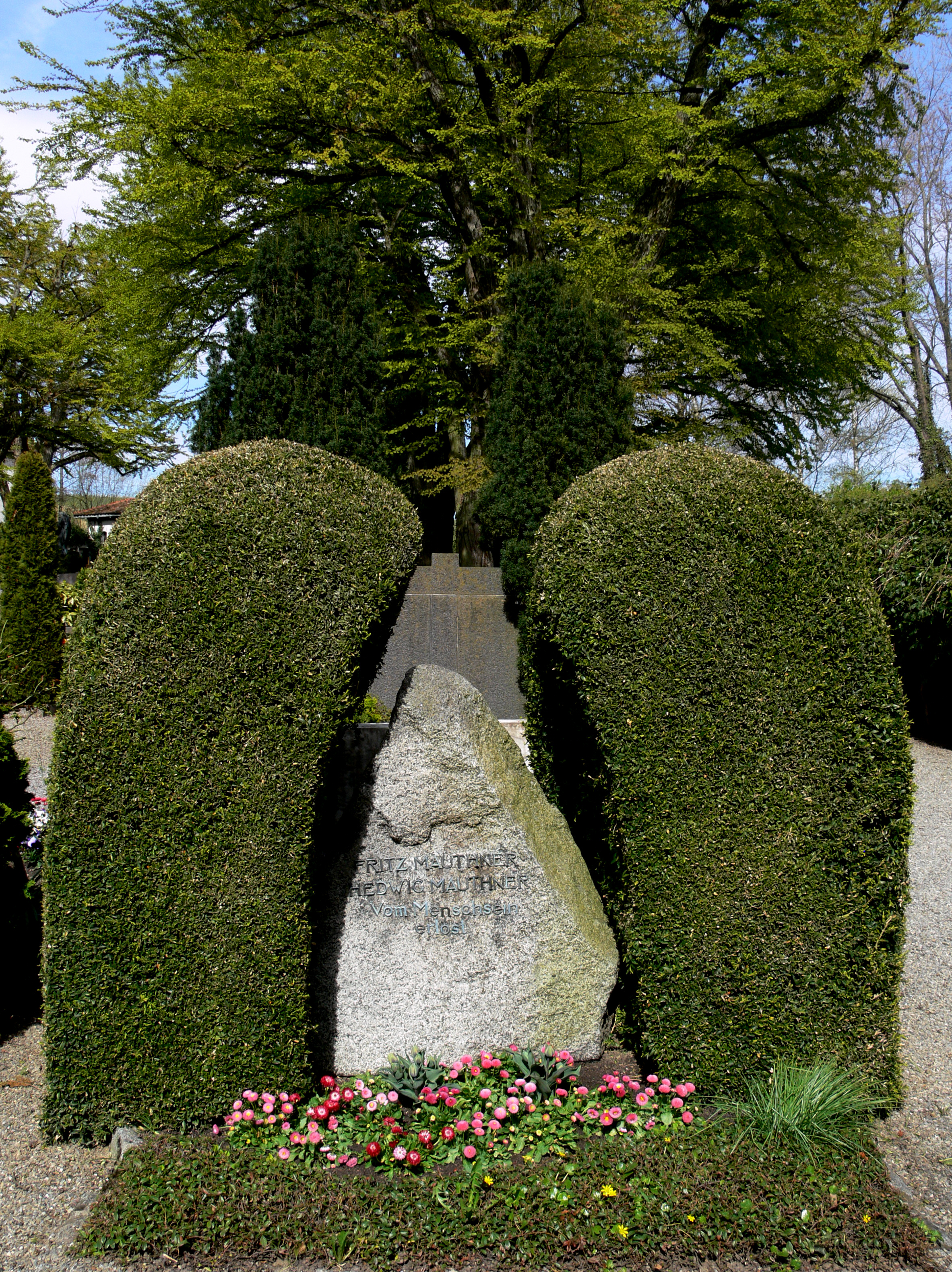 Friedhof in Meersburg (Bodenseekreis) Grabstätte Fritz Mauthner und Hedwig Mauthner (= Harriet Straub)